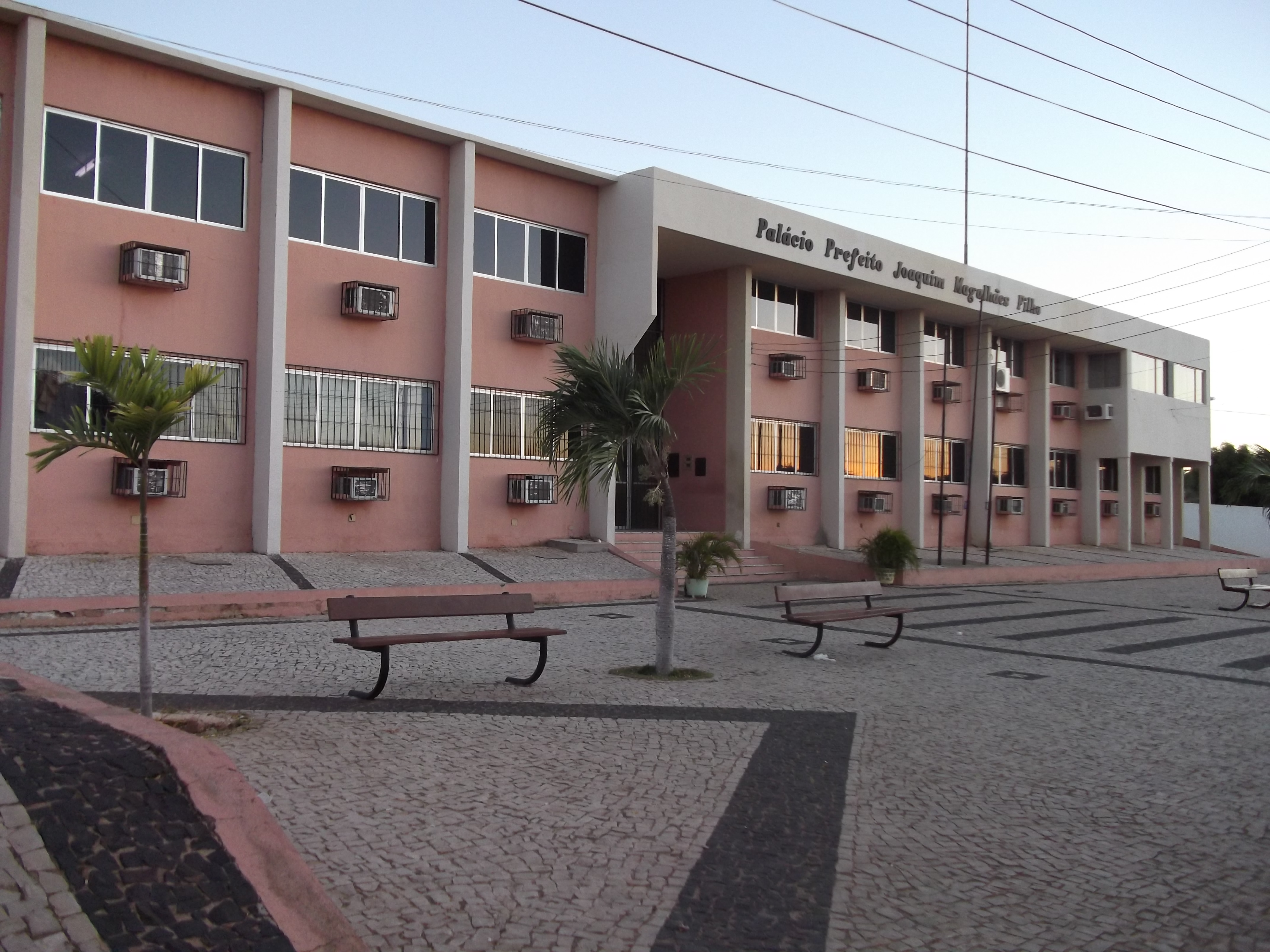 Canidndé, Ceará, Brasil